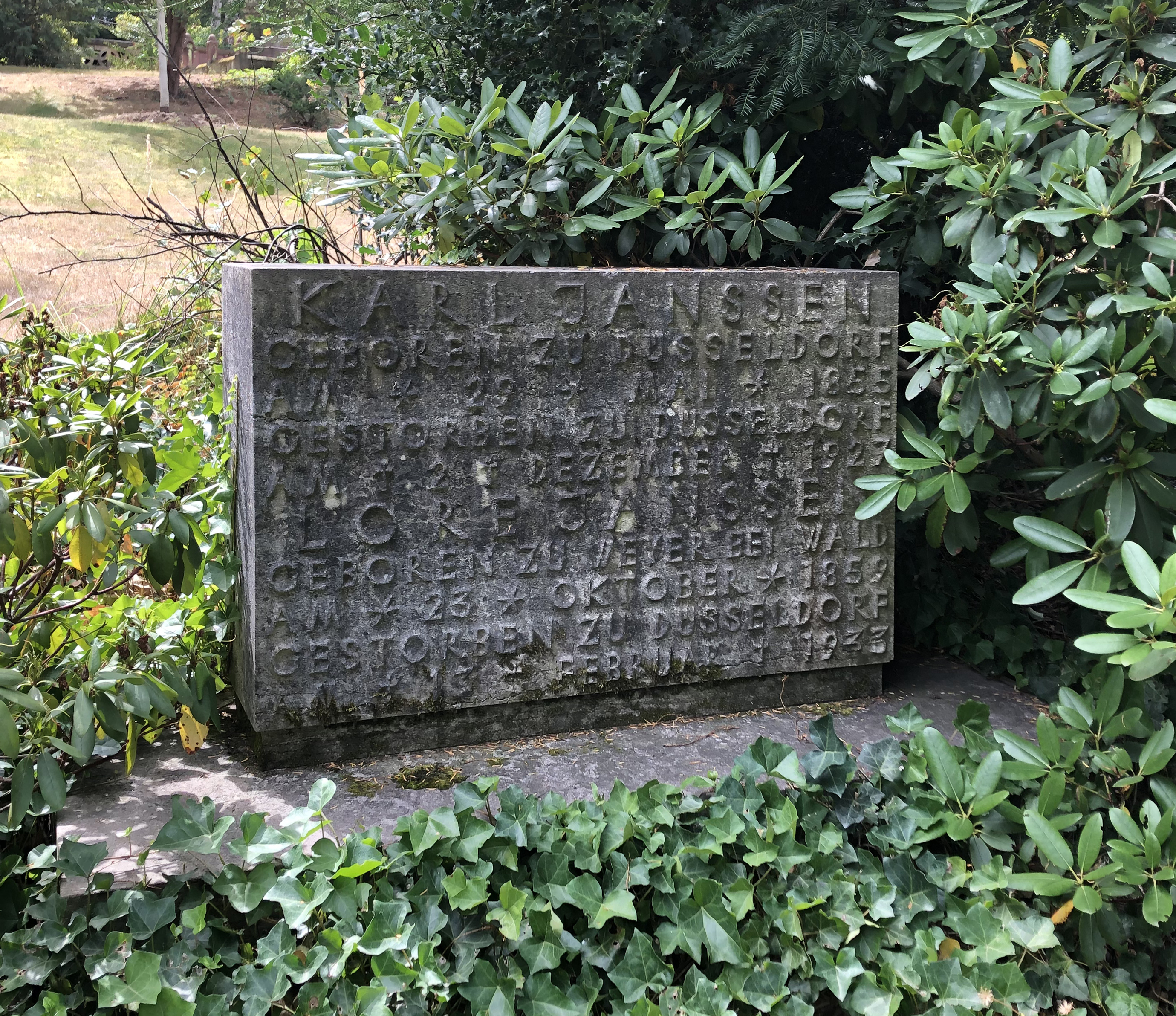 Grabstein Karl Janssen (1855–1927) und Lore Janssen (1859–1933), Nordfriedhof Düsseldorf